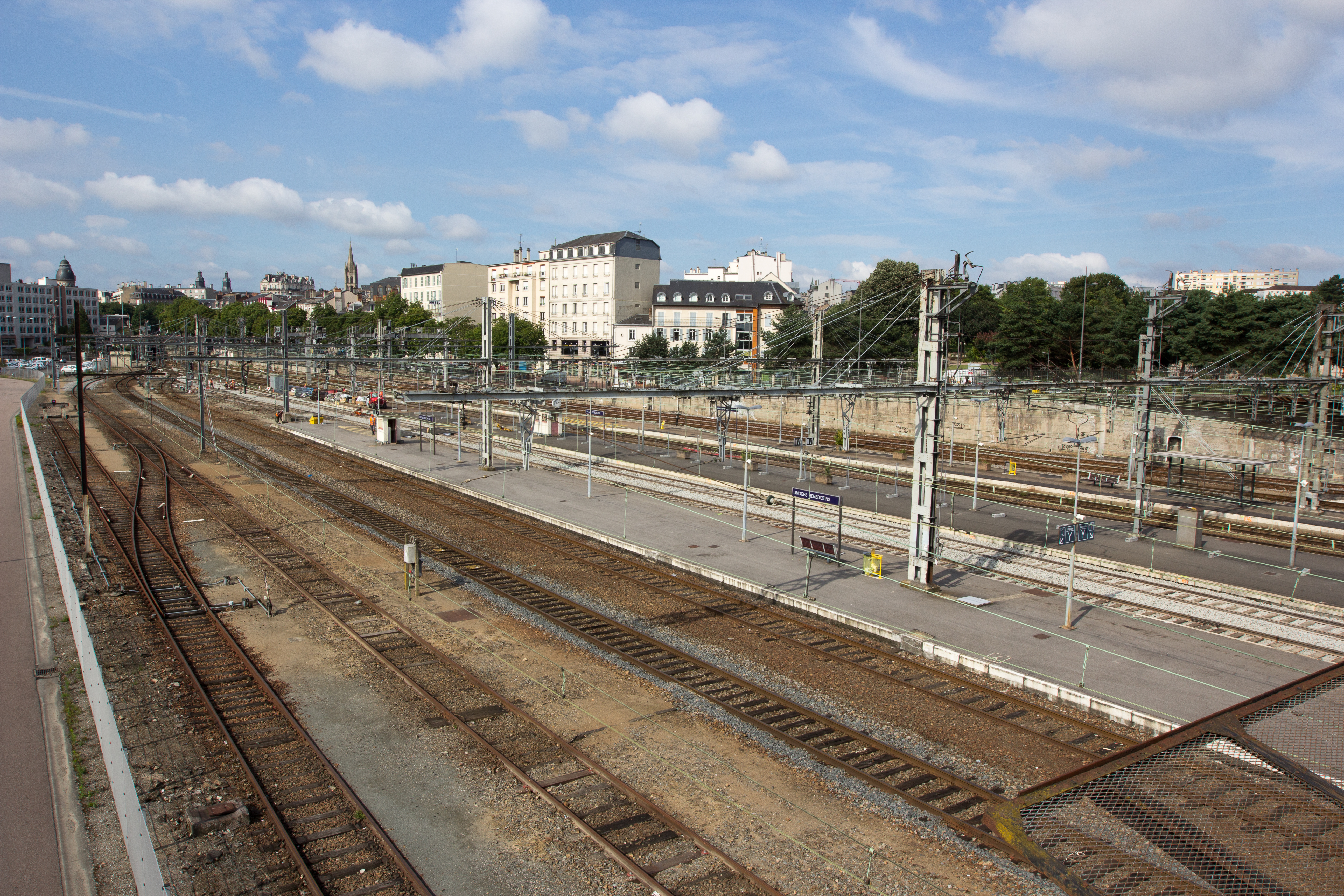 Quais de la gare de Limoges-Bénédictins / Limoges / Haute-Vienne / France